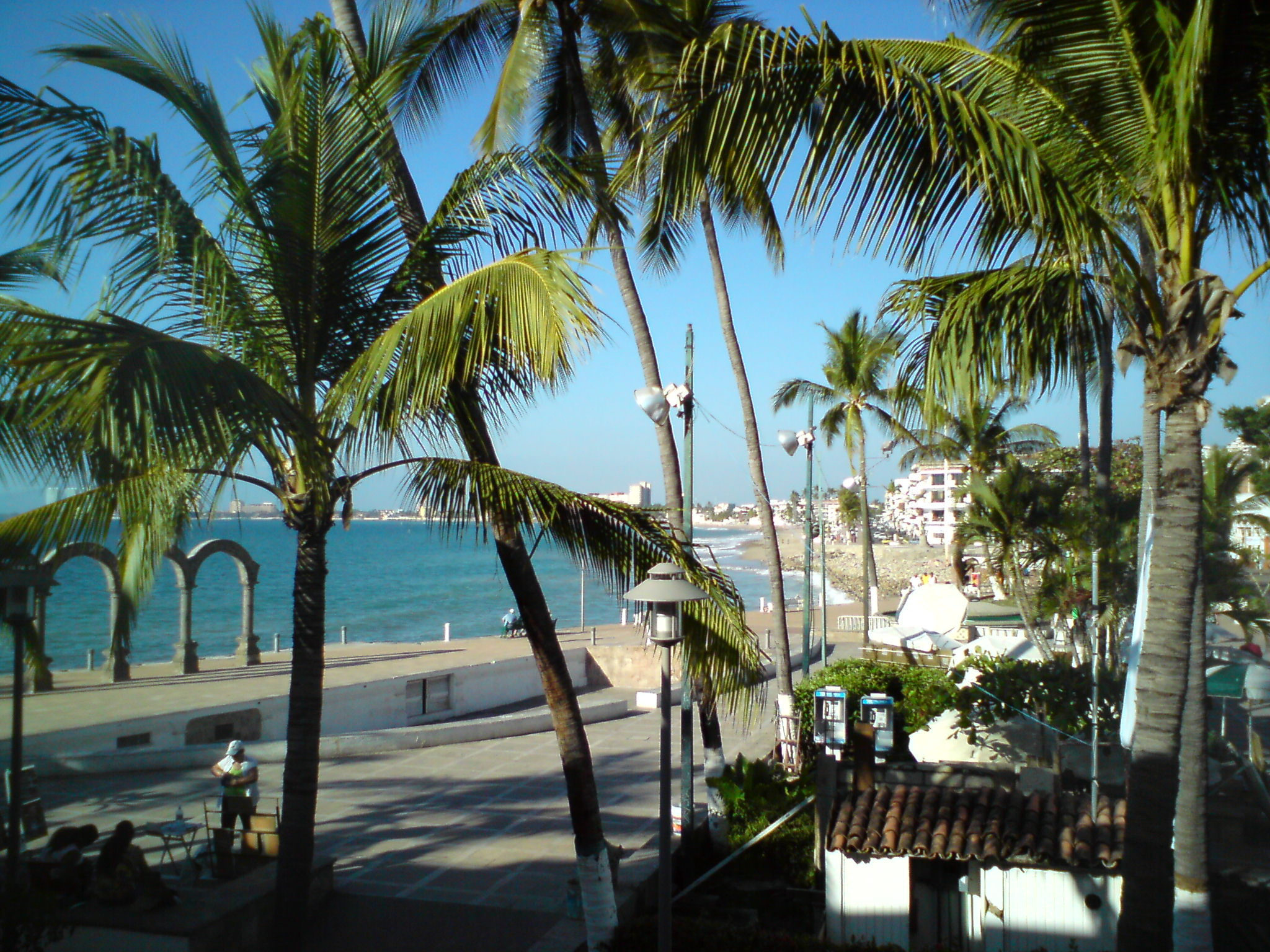 UNA VISTA HERMOSA